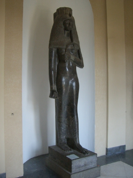 Statue colossale de la reine Mout-touya ou Touya, épouse de Séthi Ier et mère de Ramsès II, trouvée au Ramesséum - Museo Gregoriano du Vatican - Vatican City